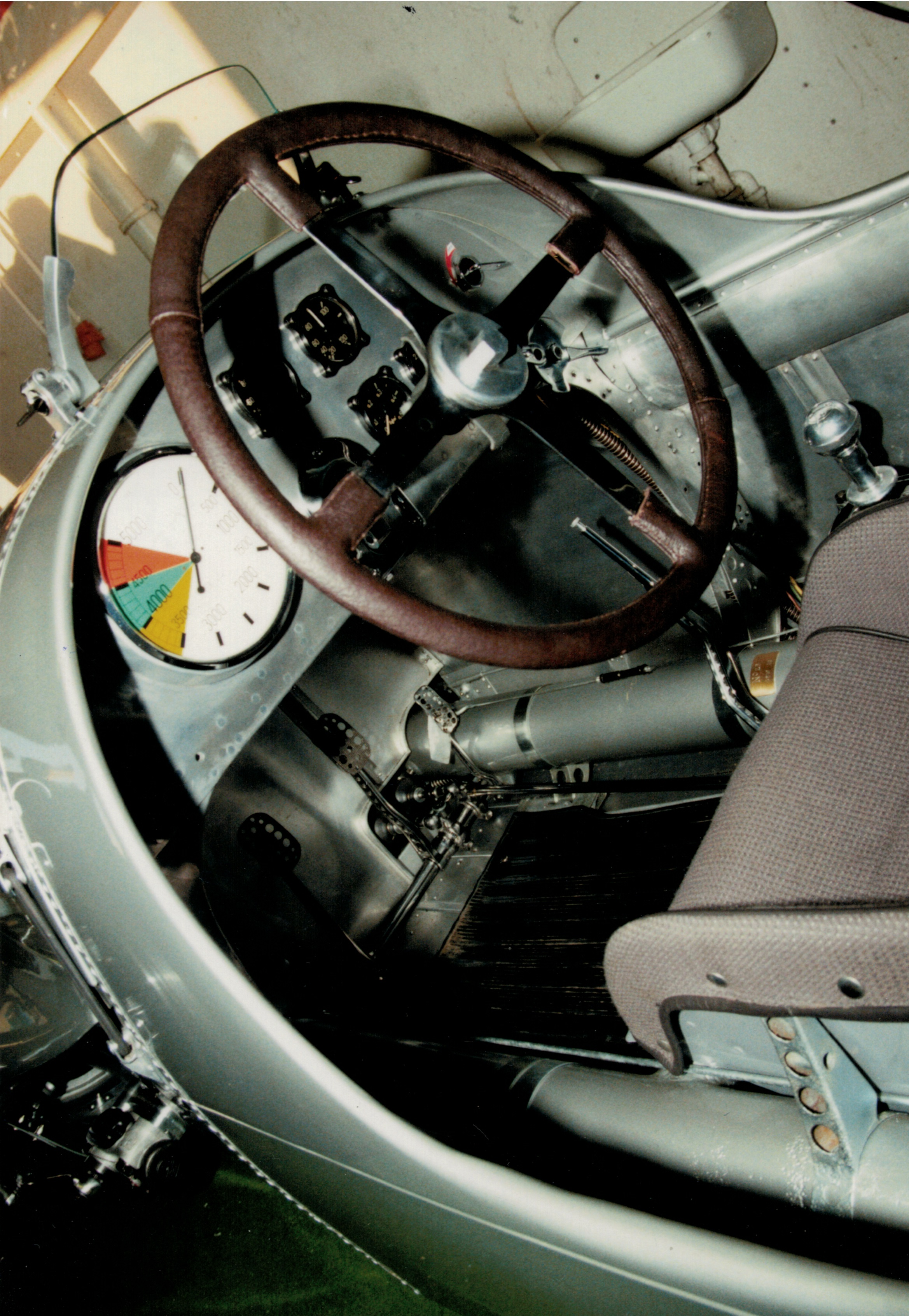 September 1997 am Nürburgring